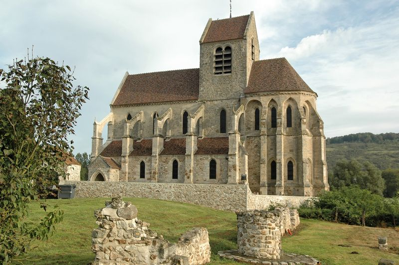 Église de Mezy-Moulins dans le sud de l'Aisne.